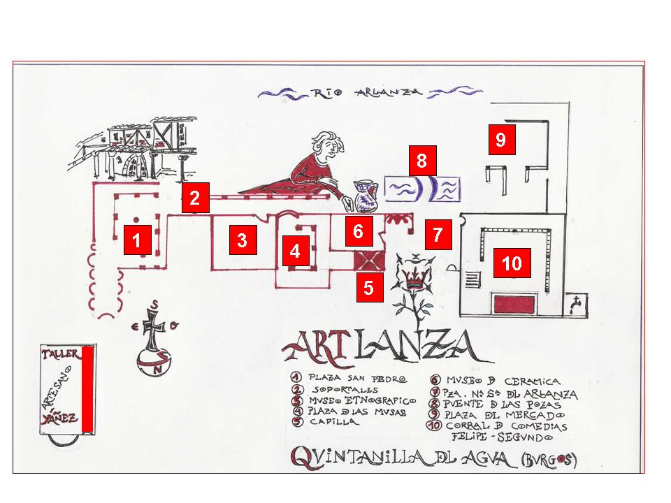 Imagen que muestra el plano del museo